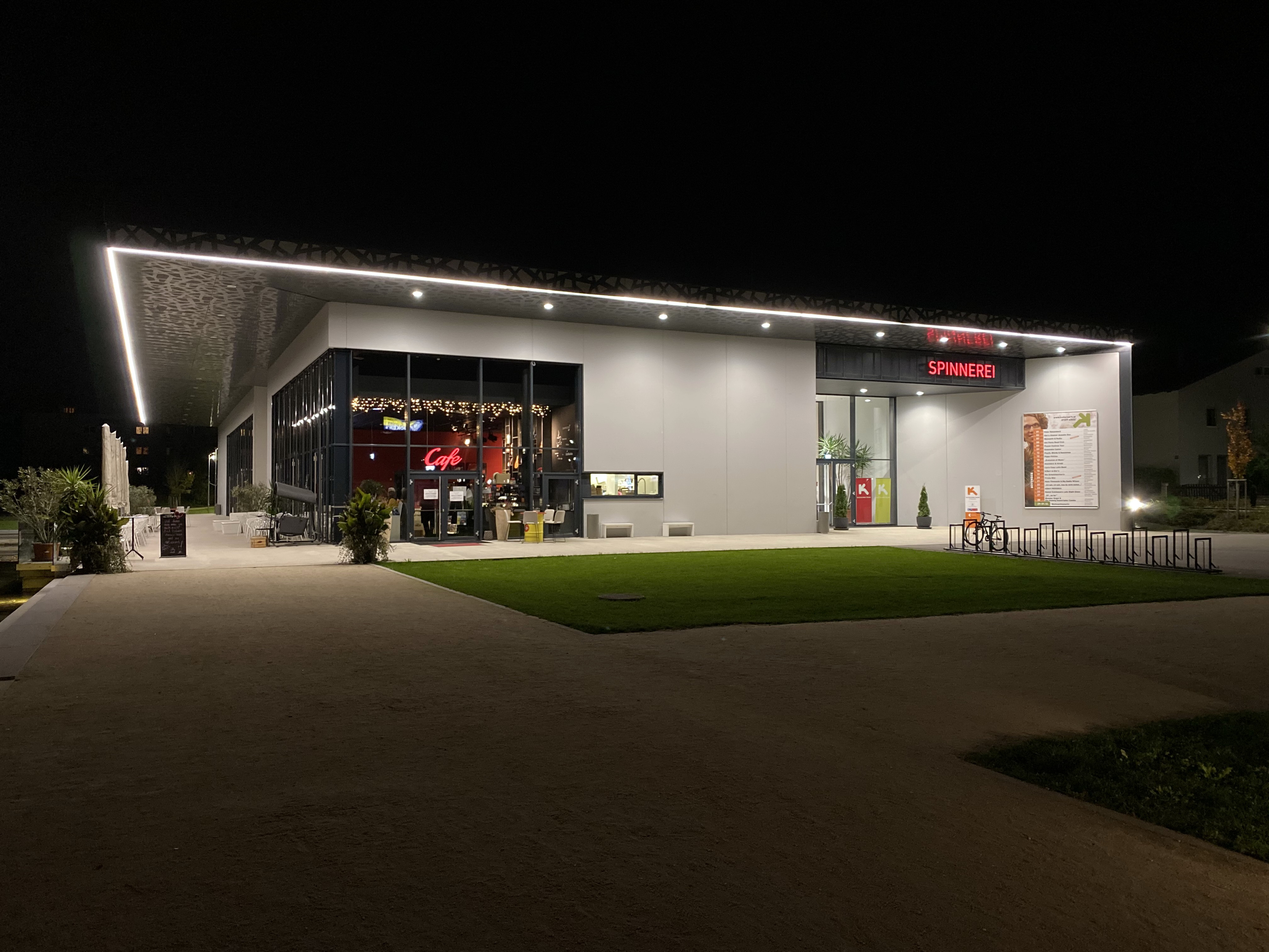 Veranstaltungsort